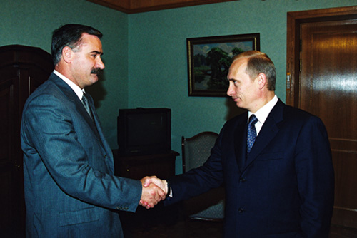 СТАВРОПОЛЬСКИЙ КРАЙ, КИСЛОВОДСК. С Президентом Ингушетии Русланом Аушевым.